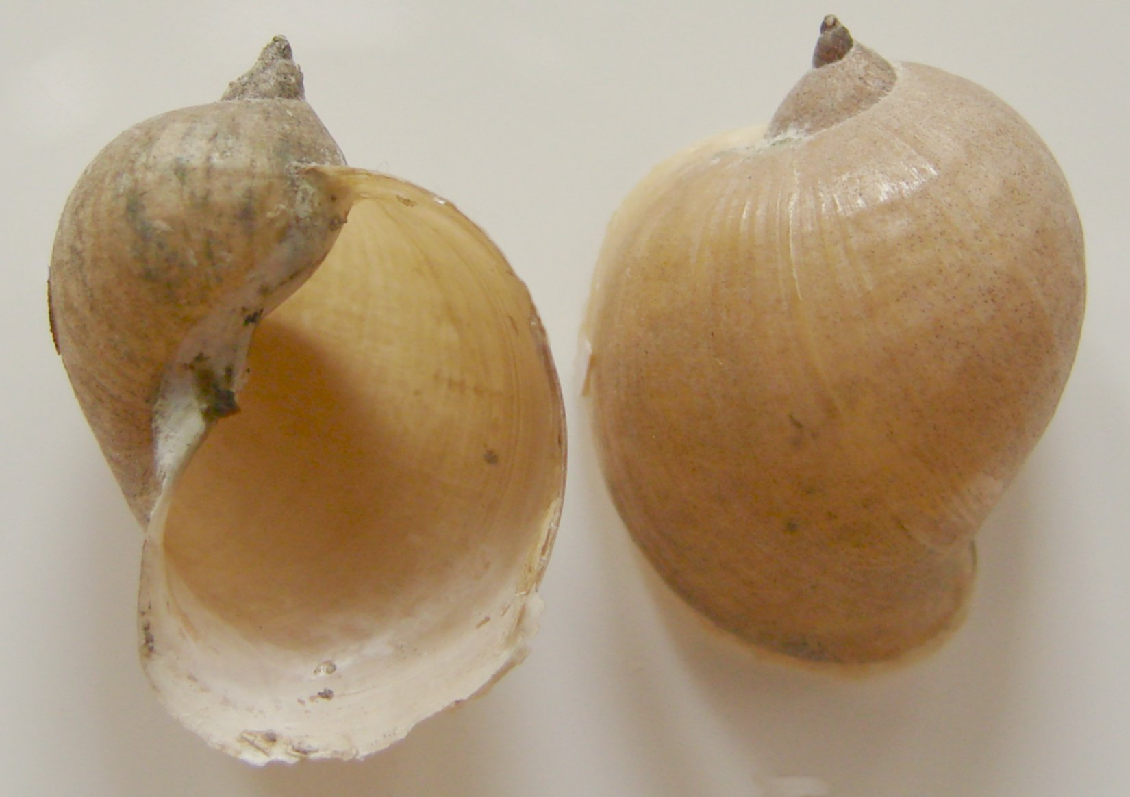 Lymnaea auricularia (Radix auricularia)